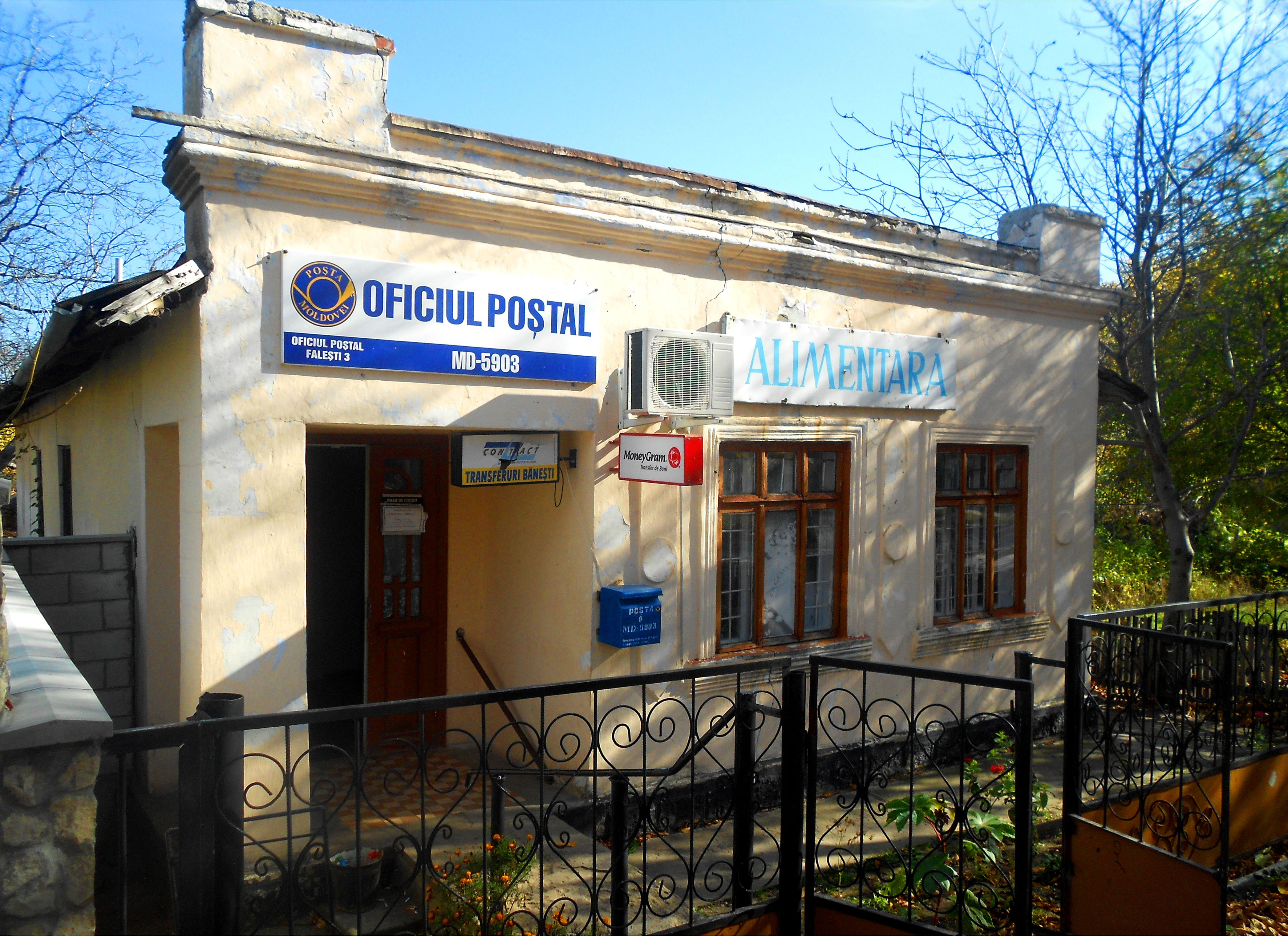 Oficiu poștal și Alimentară din Fălești